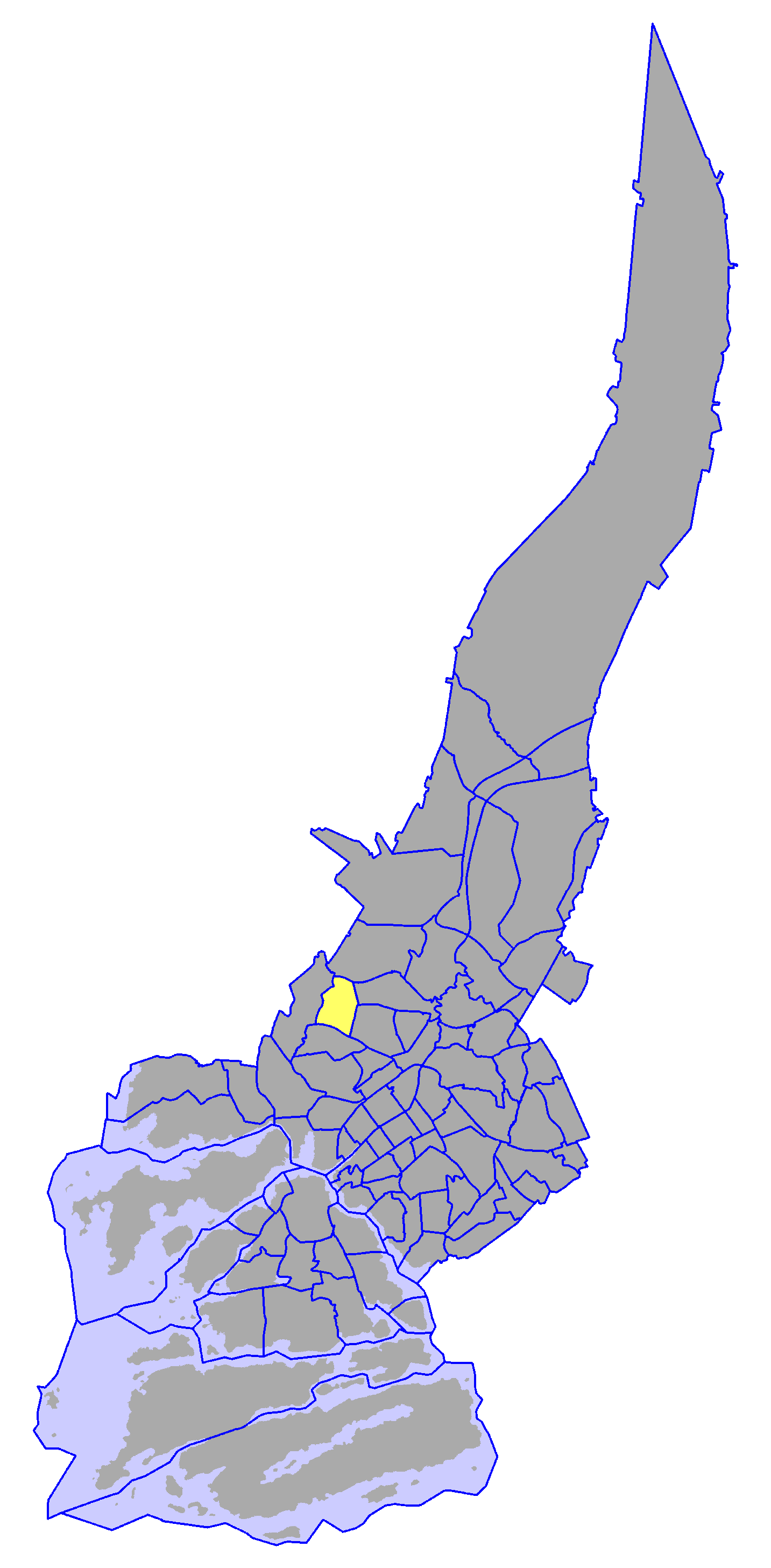 District of Teräsrautela, in Turku